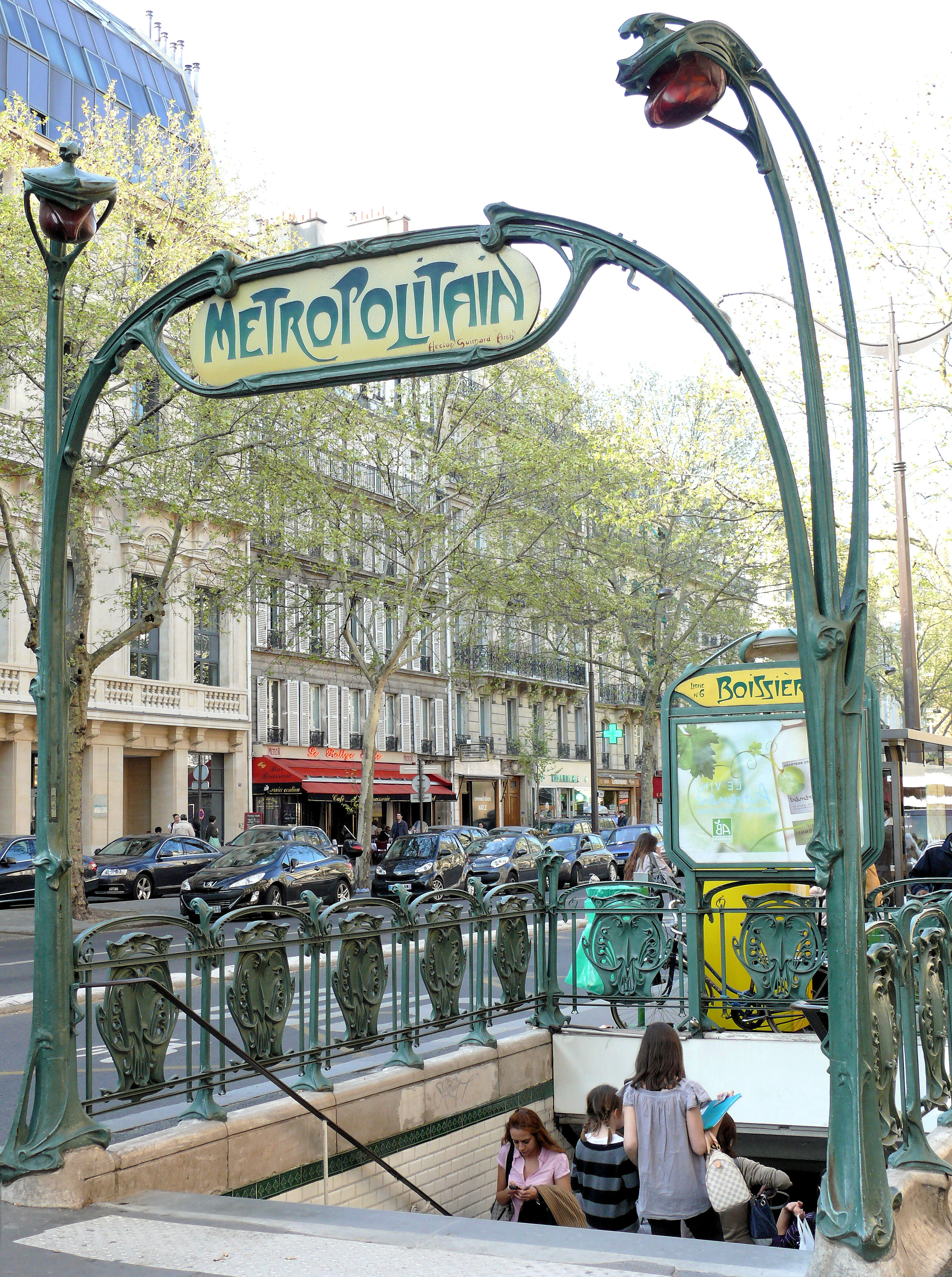 Edicule Guimard - Station de métro Boissière